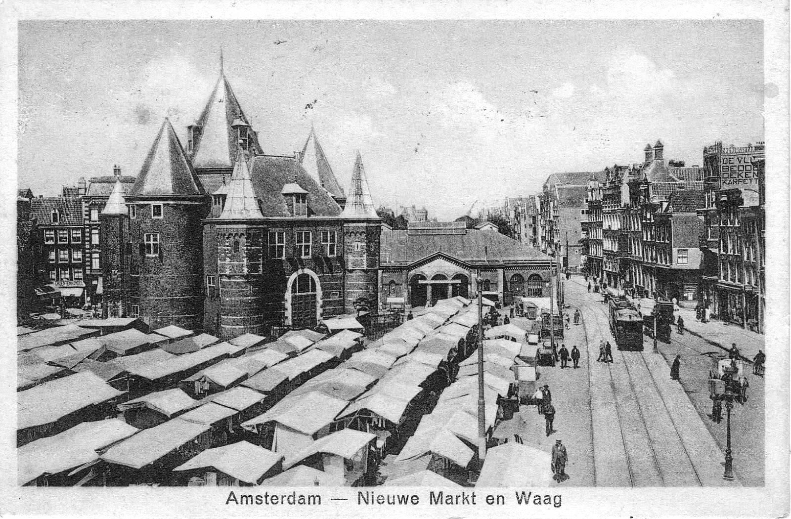 Photographed in Amsterdam between 1900 and 1914.